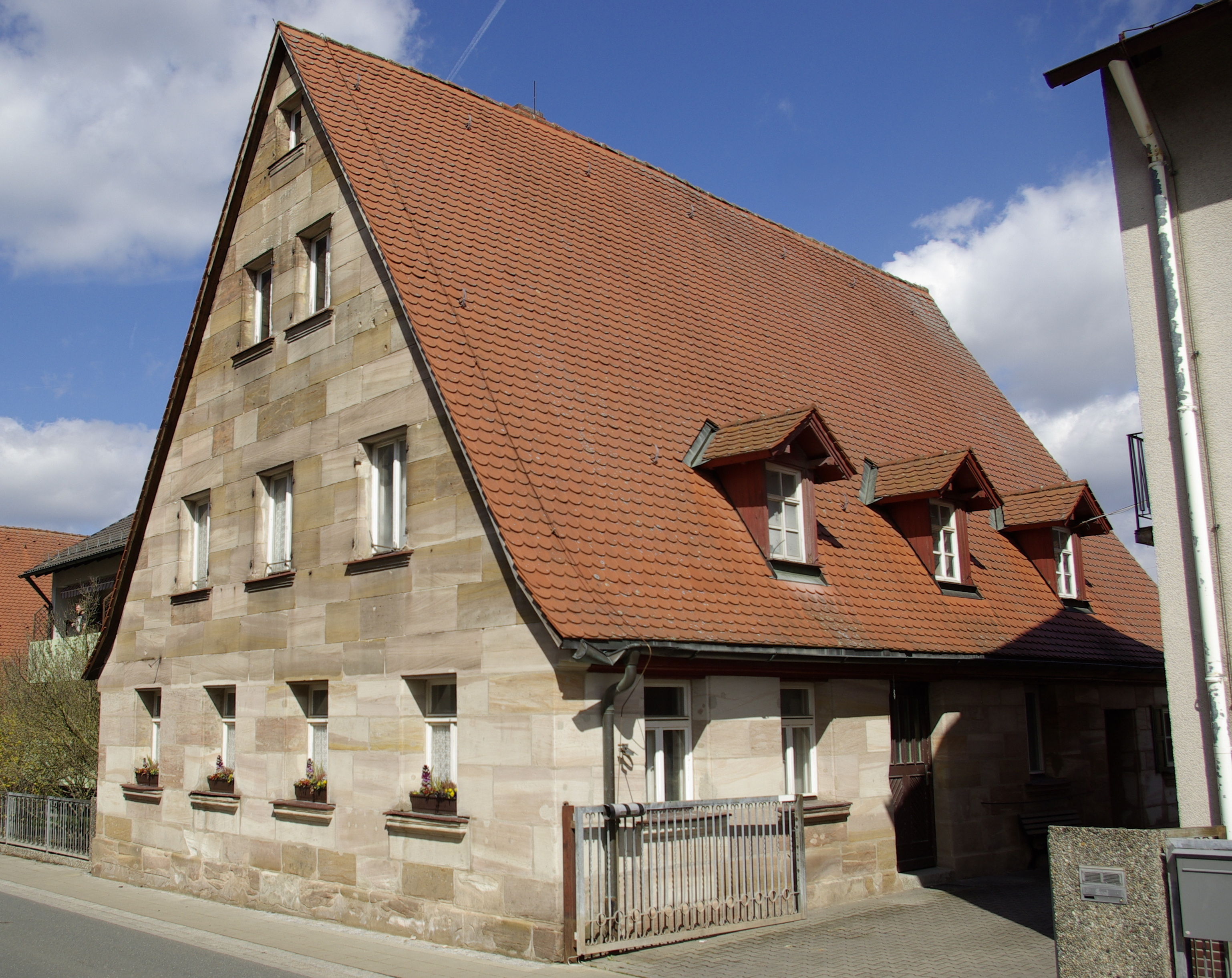 Ronhofer Hauptstraße 192 im Fürther Stadtteil Ronhof